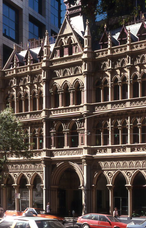 olderfleet building, melbourne, australia